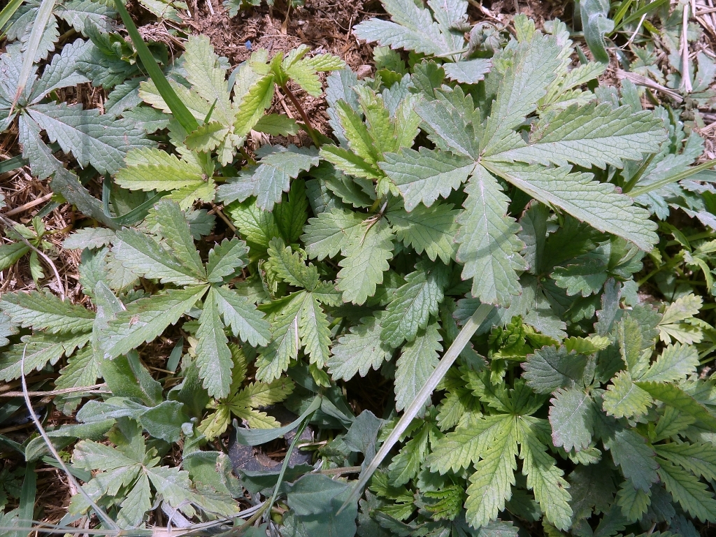 Potentilla reptans (Cincoenrama) : Hojas de 5 lóbulos que le dan uno de sus numerosos nombres vernáculos en Castellano - La Huerta, Albatera (Alicante, España).